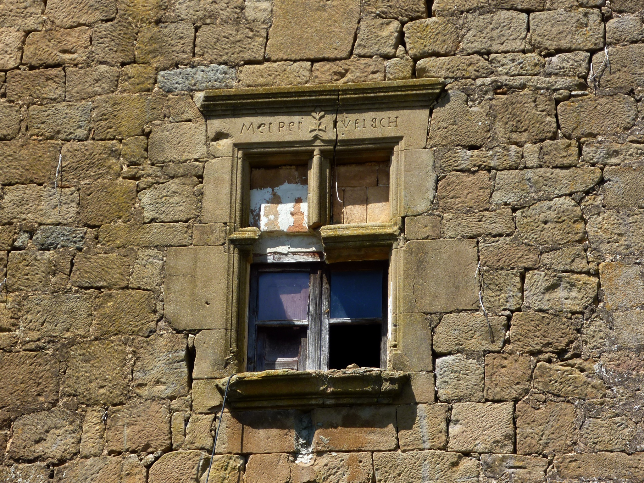 Masia Caelles (Pinell de Solsonès): detall d'una fiestra